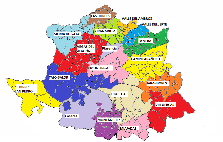 Comarcas de la provincia de Cáceres, en España